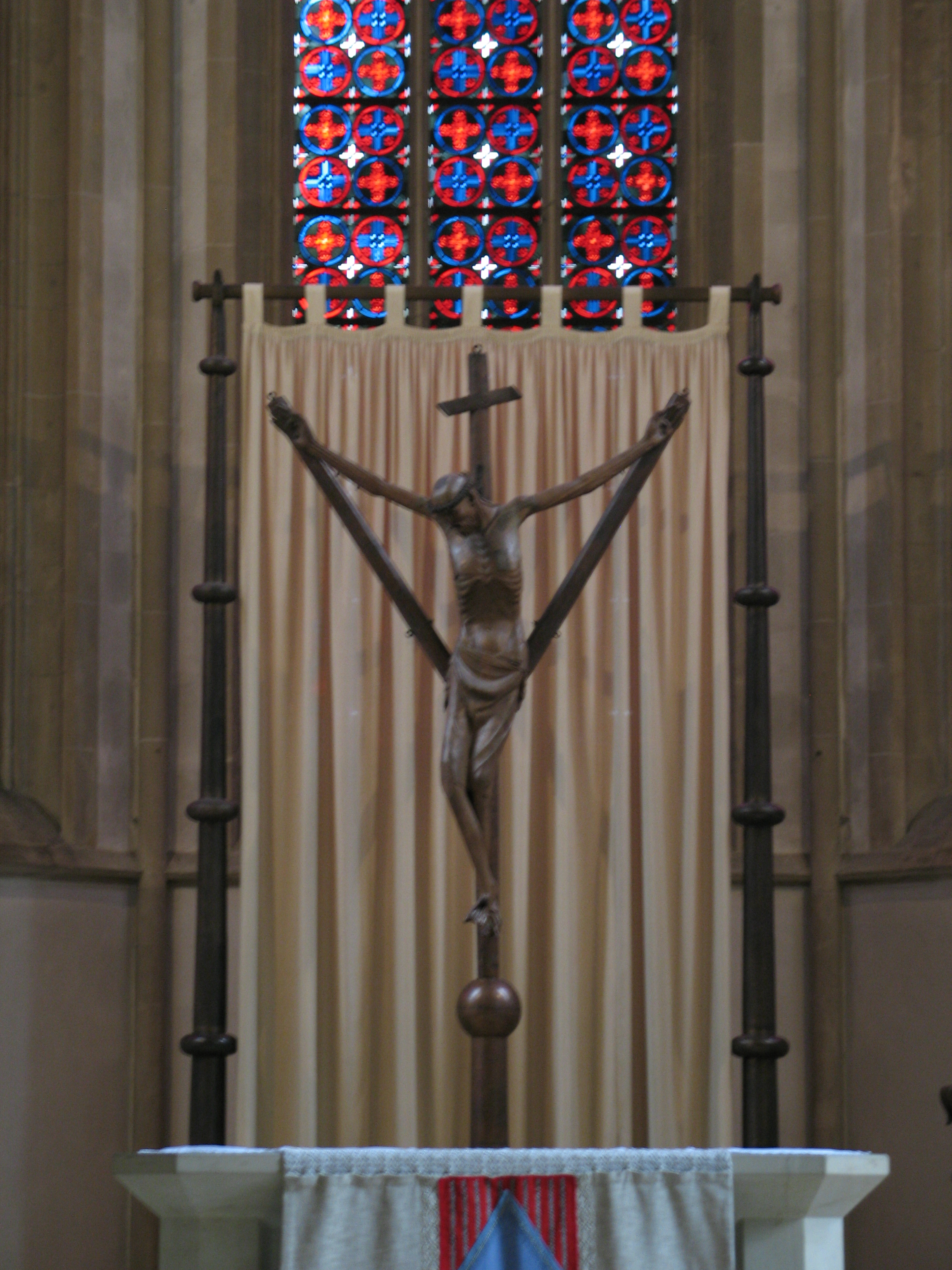 Cruz en la Iglesia de San Lamberti en Coesfeld.